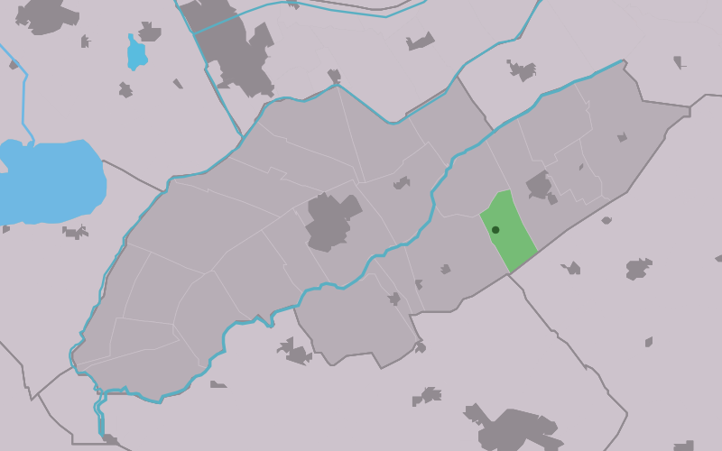 Kaartsje fan himrik fan Finkegea